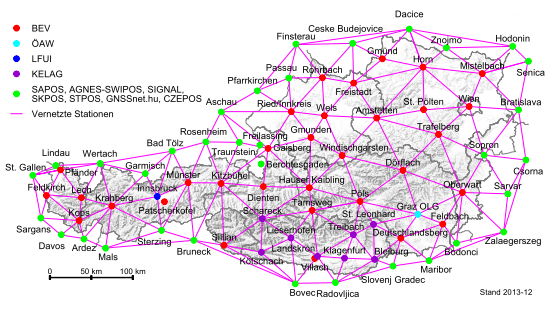 Übersicht der Stationen von APOS